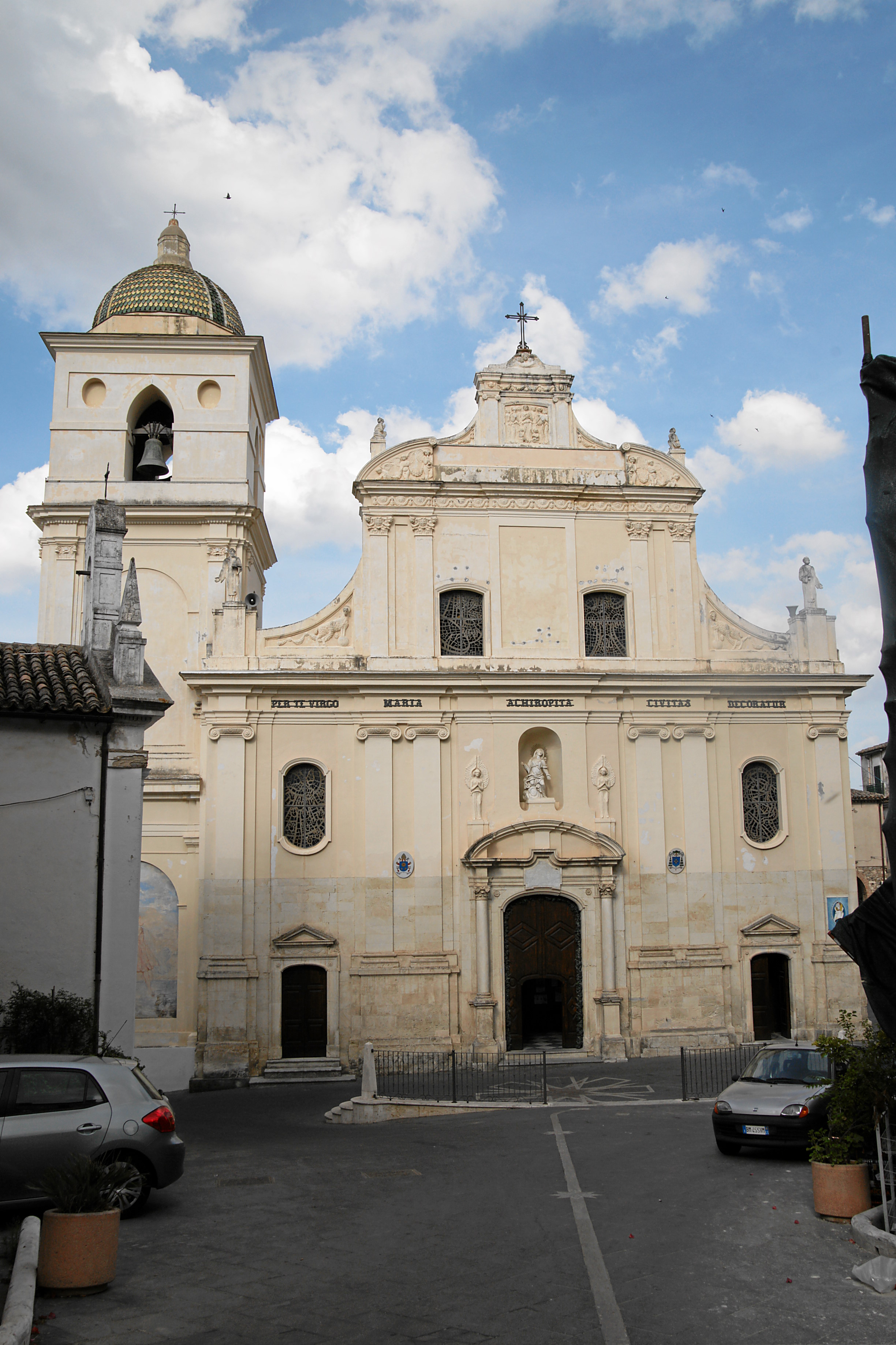 Cattedrale Maria Santissima Achiropita